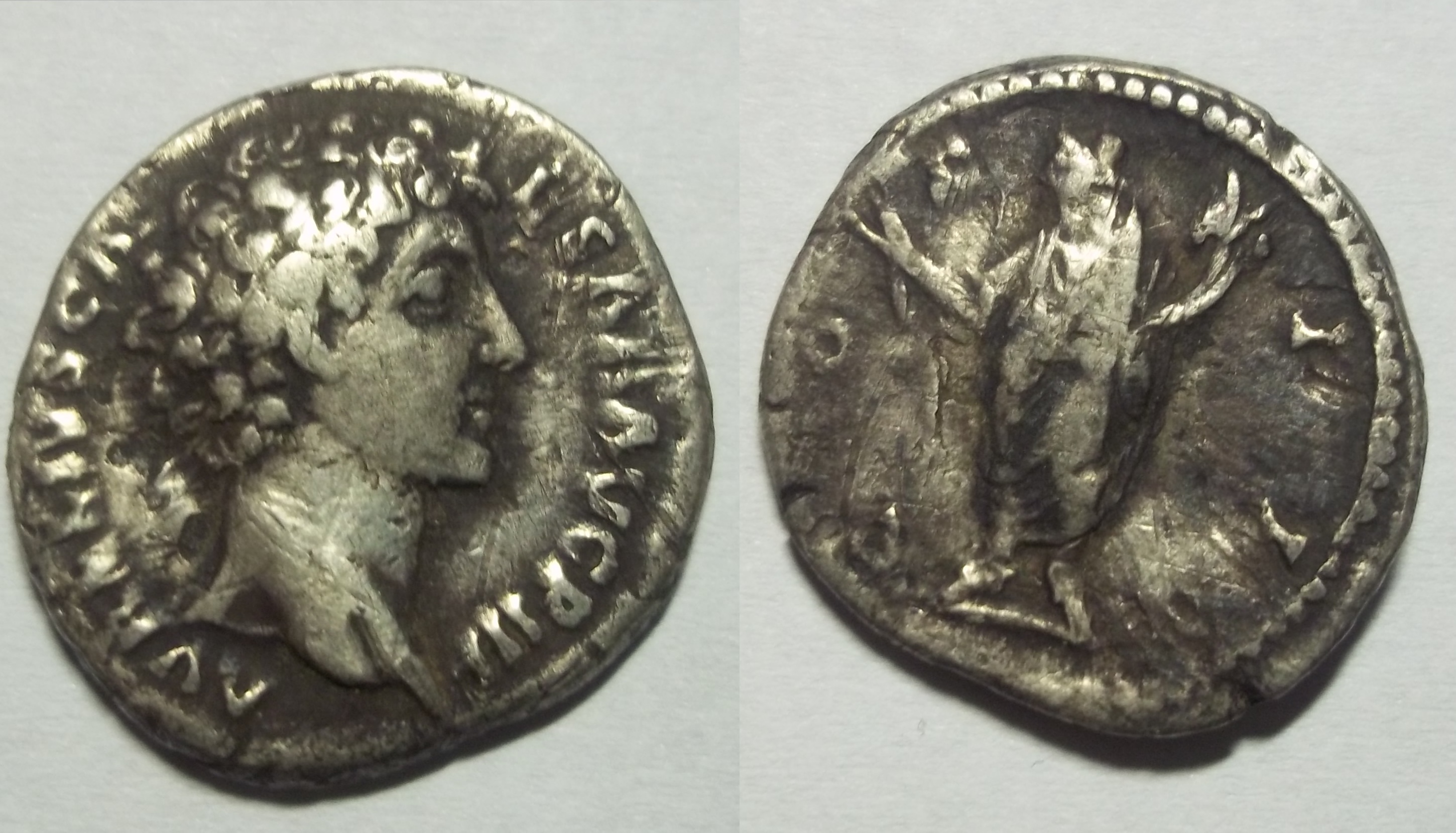 Срібний римський денарій імператора Марка Аврелія(121- 180 р.) знайдений під час сільськогосподарських робіт у селі Закутинці